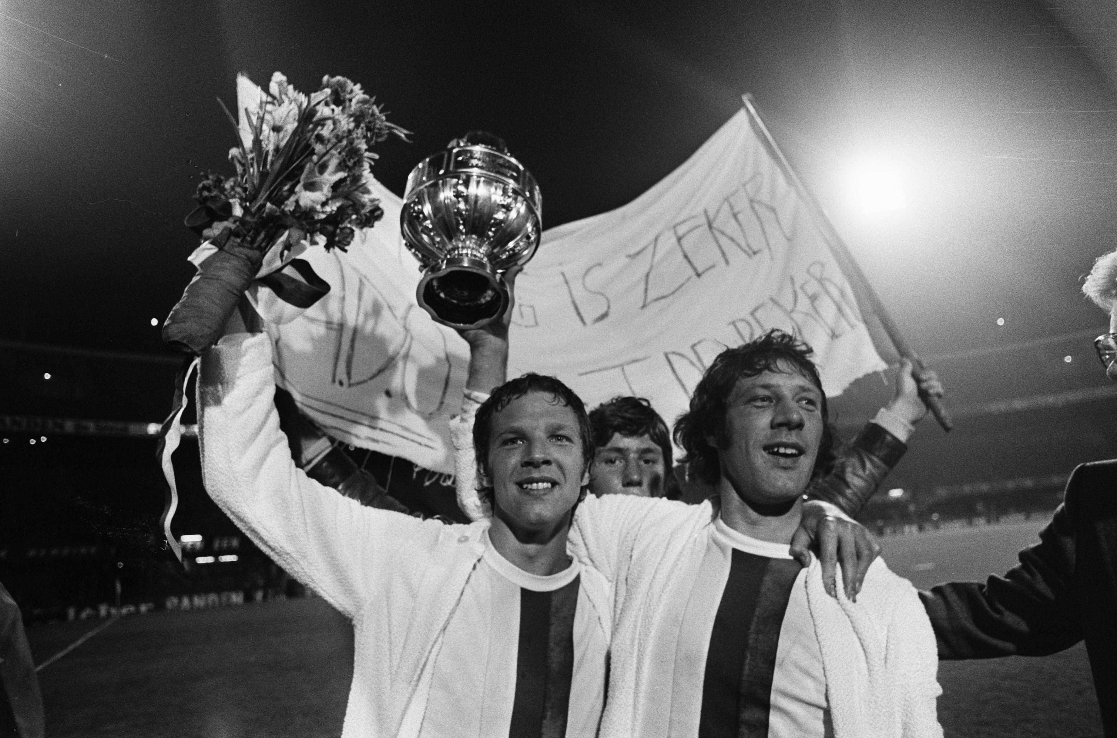 Collectie / Archief : Fotocollectie Anefo Reportage / Serie : FC Den Haag-FC Twente 1-0 (KNVB-beker) Beschrijving : Van Leeuwen (links) en Mansveld met de gewonnen beker Datum : 15 mei 1975 Locatie : Den Haag, Zuid-Holland Trefwoorden : bekers, spelers, sport, voetbal Persoonsnaam : Leeuwen, Henk van, Mansveld, Aad Fotograaf : Fotograaf Onbekend / Anefo Auteursrechthebbende : Nationaal Archief Materiaalsoort : Negatief (zwart/wit) Nummer archiefinventaris : bekijk toegang 2.24.01.05 Bestanddeelnummer : 927-9294